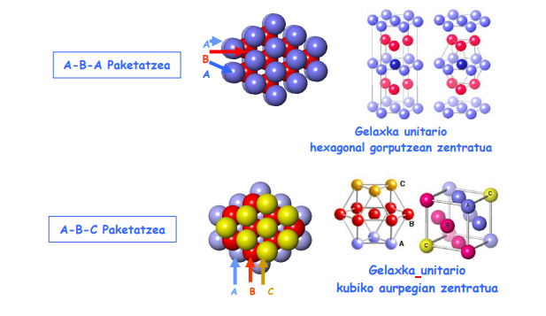 ABA eta ABC paketatzea